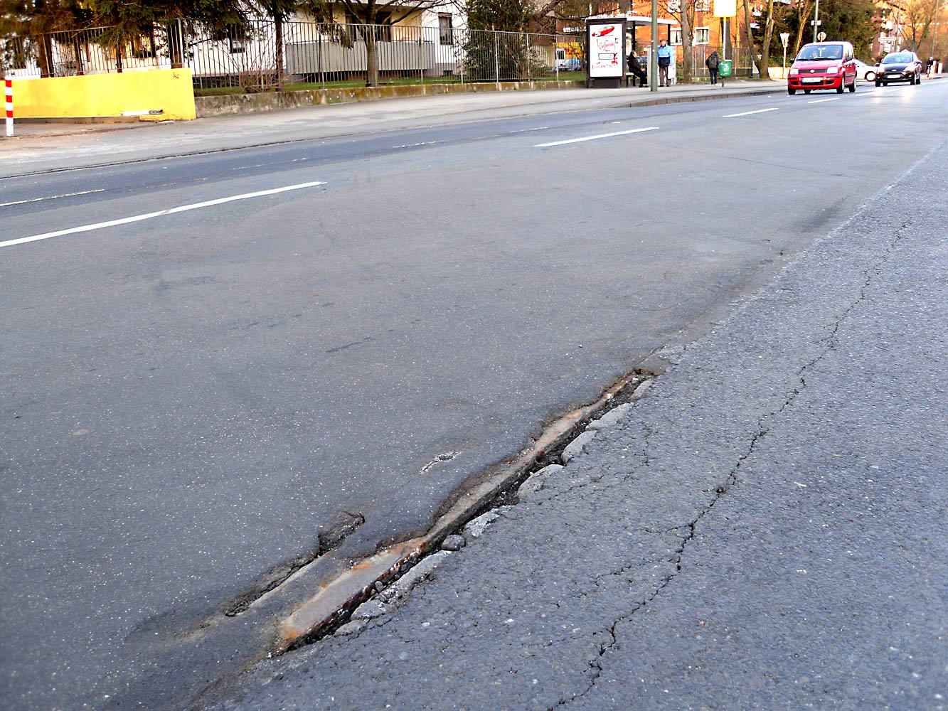 Tram in Benrath